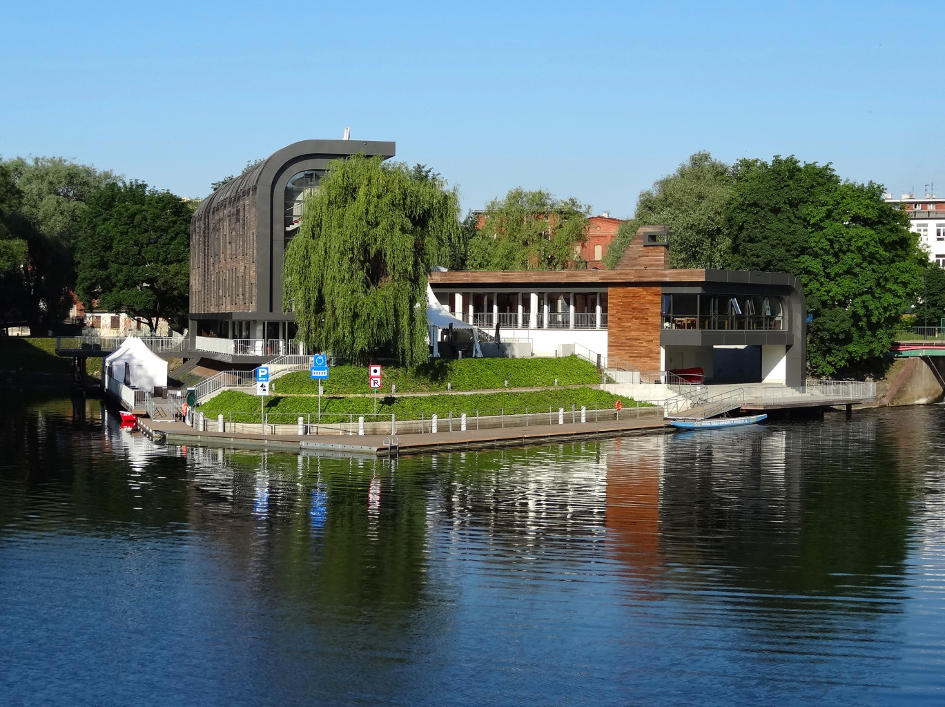 Przystań Bydgoszcz na Wyspie Młyńskiej